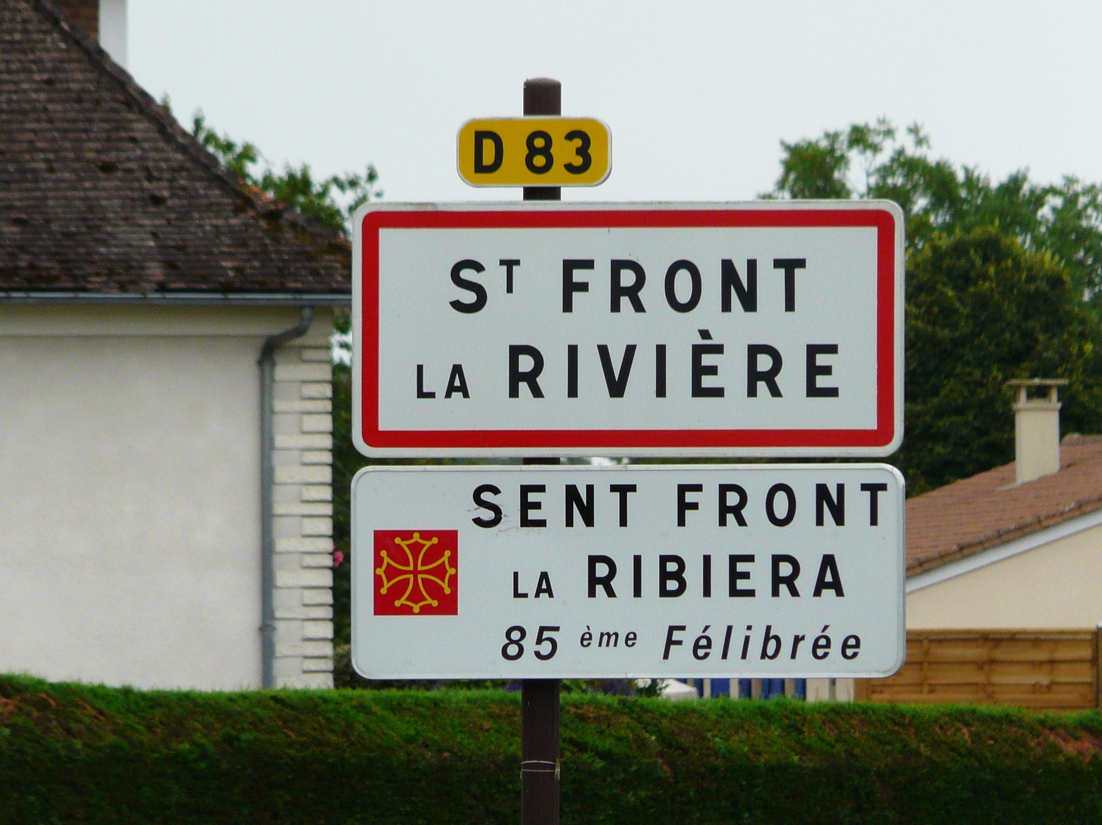 Panneau d'entrée à Saint-Front-la-Rivière avec le nom occitan, Dordogne, France.